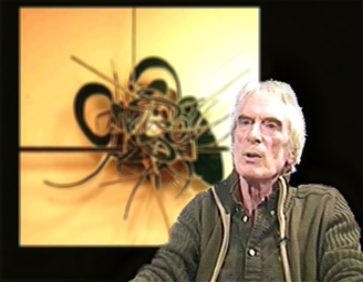 Portrait de Alain Satié